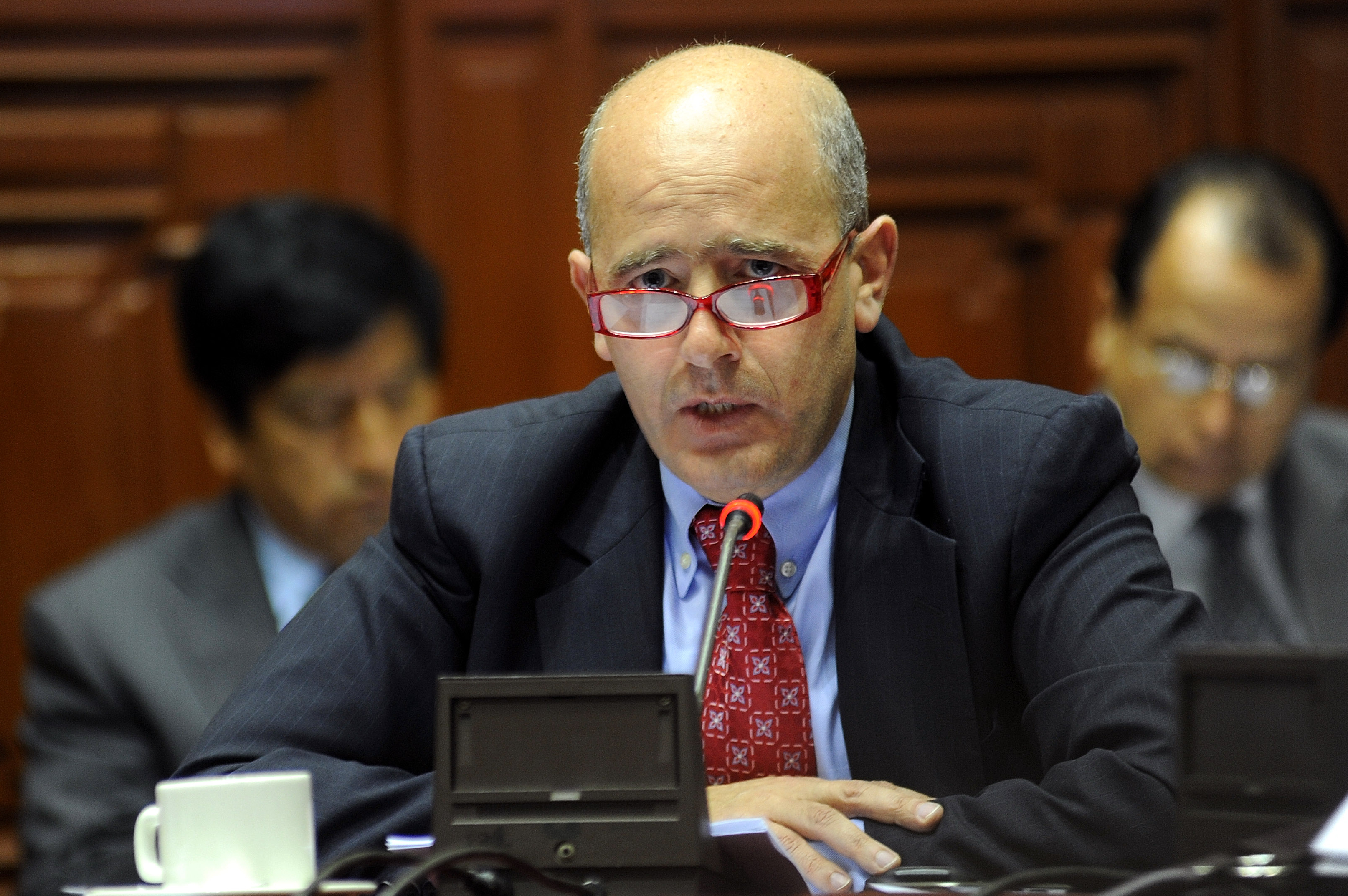 Congresista Isaac Mekler Neiman interviene en sesión realizada esta tarde por la Comisión Permanente del Congreso.